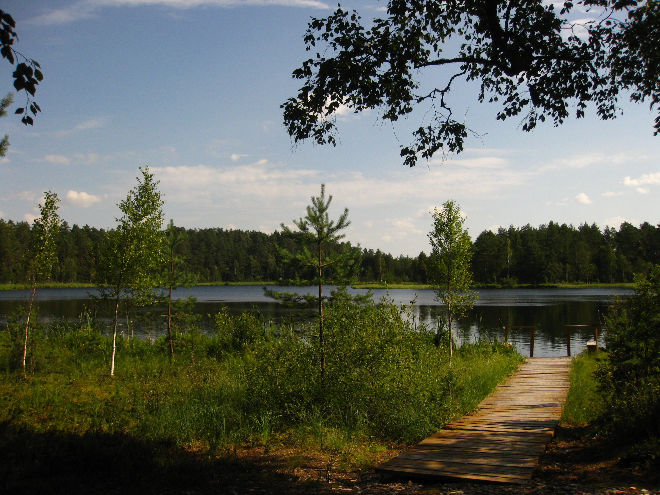 Parika Väikejärve läänekaldal